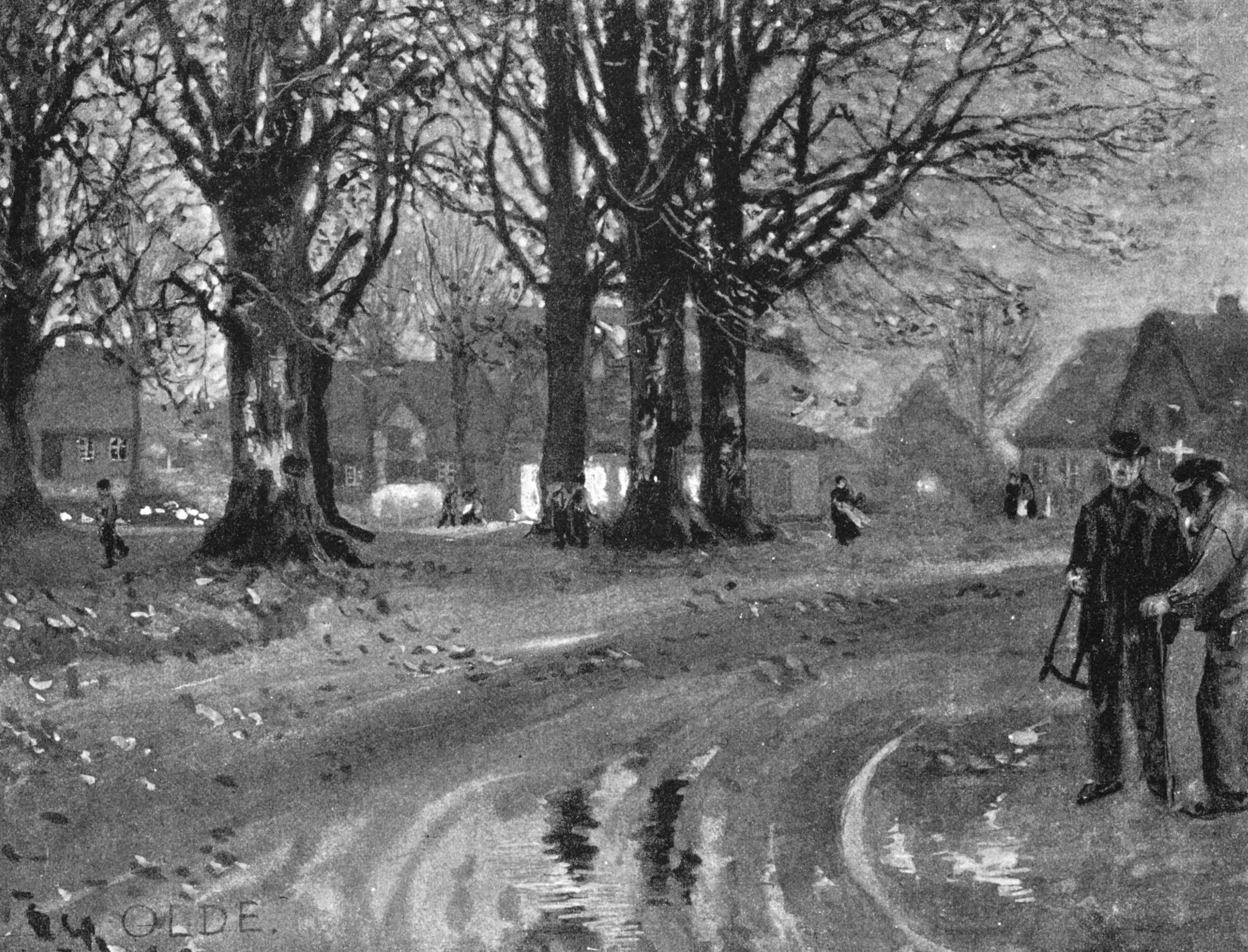 Herbstabend (Dorfplatz in Pries bei Kiel), Zeichnung von Hans Olde um 1895